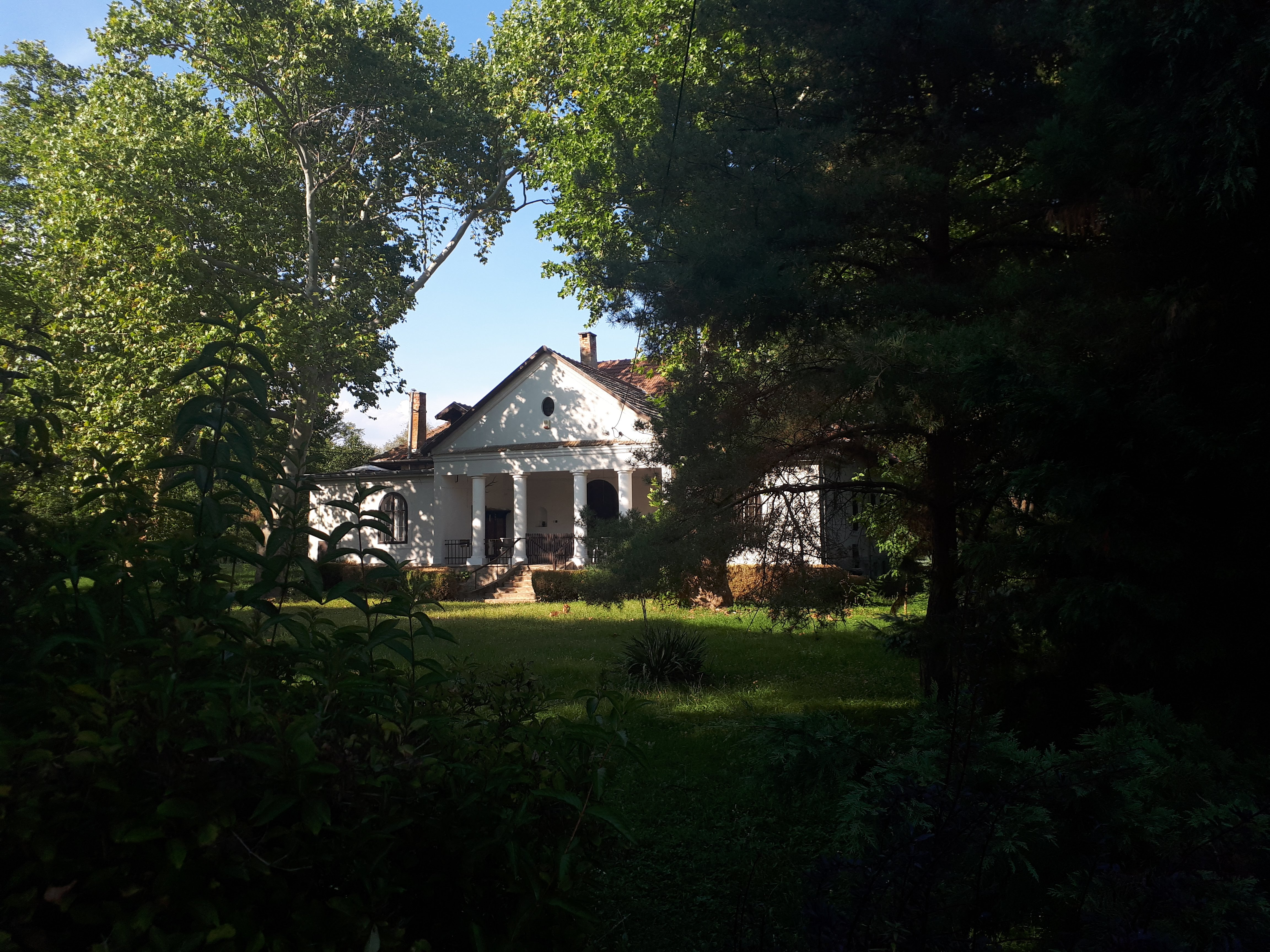 A berzéki műemlék Potoczky-Perczel-kúria, jelenleg lakóház This is a photo of a monument in Hungary. Identifier: 2669